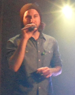 Membre du groupe Pentatonix.